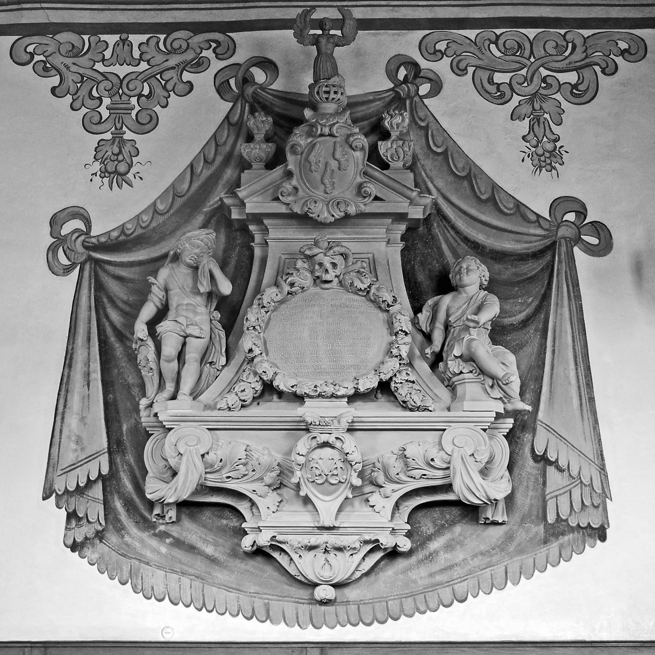 Trachselwald im Kanton Bern, Reformierte Kirche, Wappen und Inschrift im Chor der Kirche